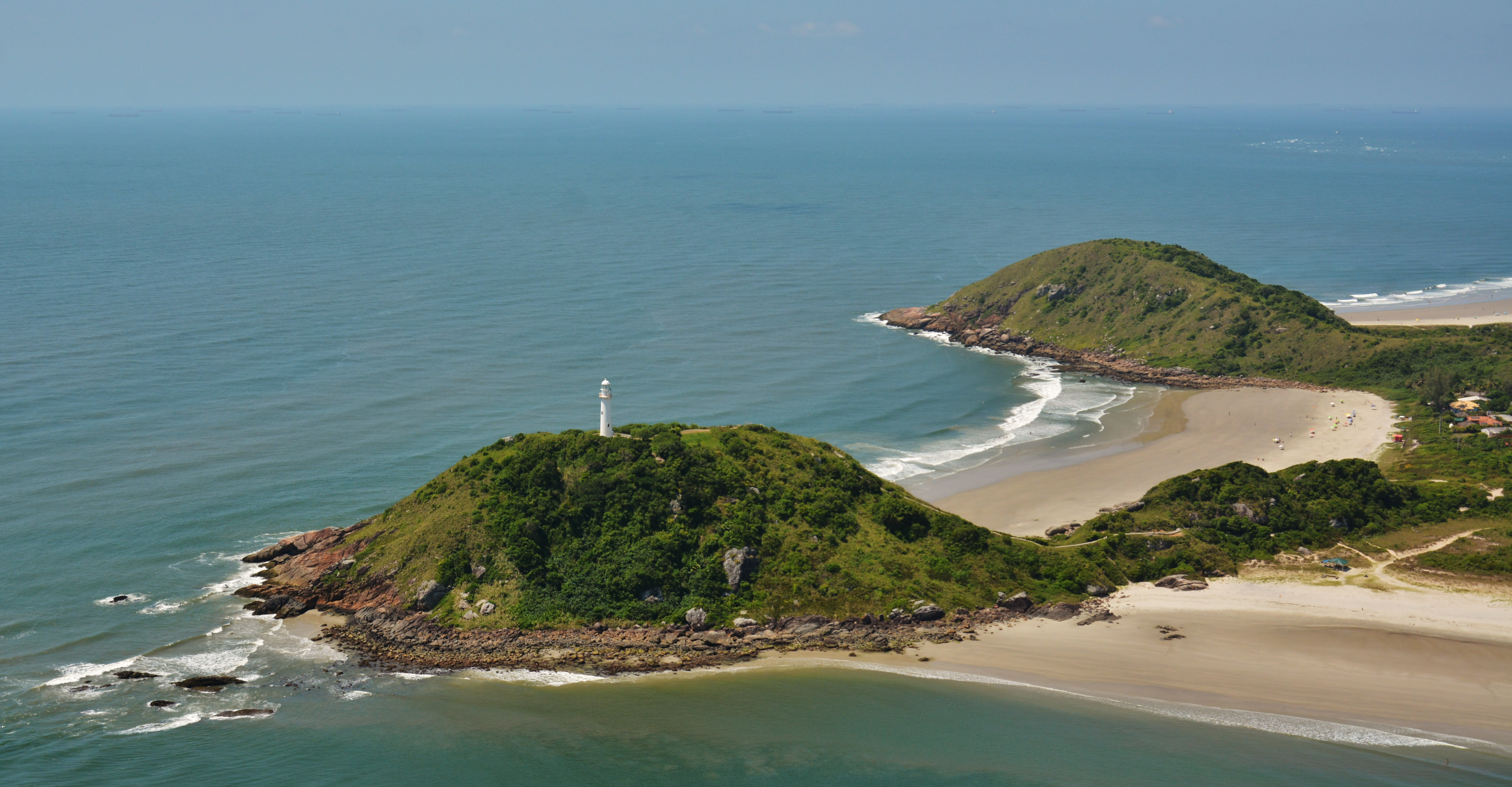 Lighthouse Honey Island